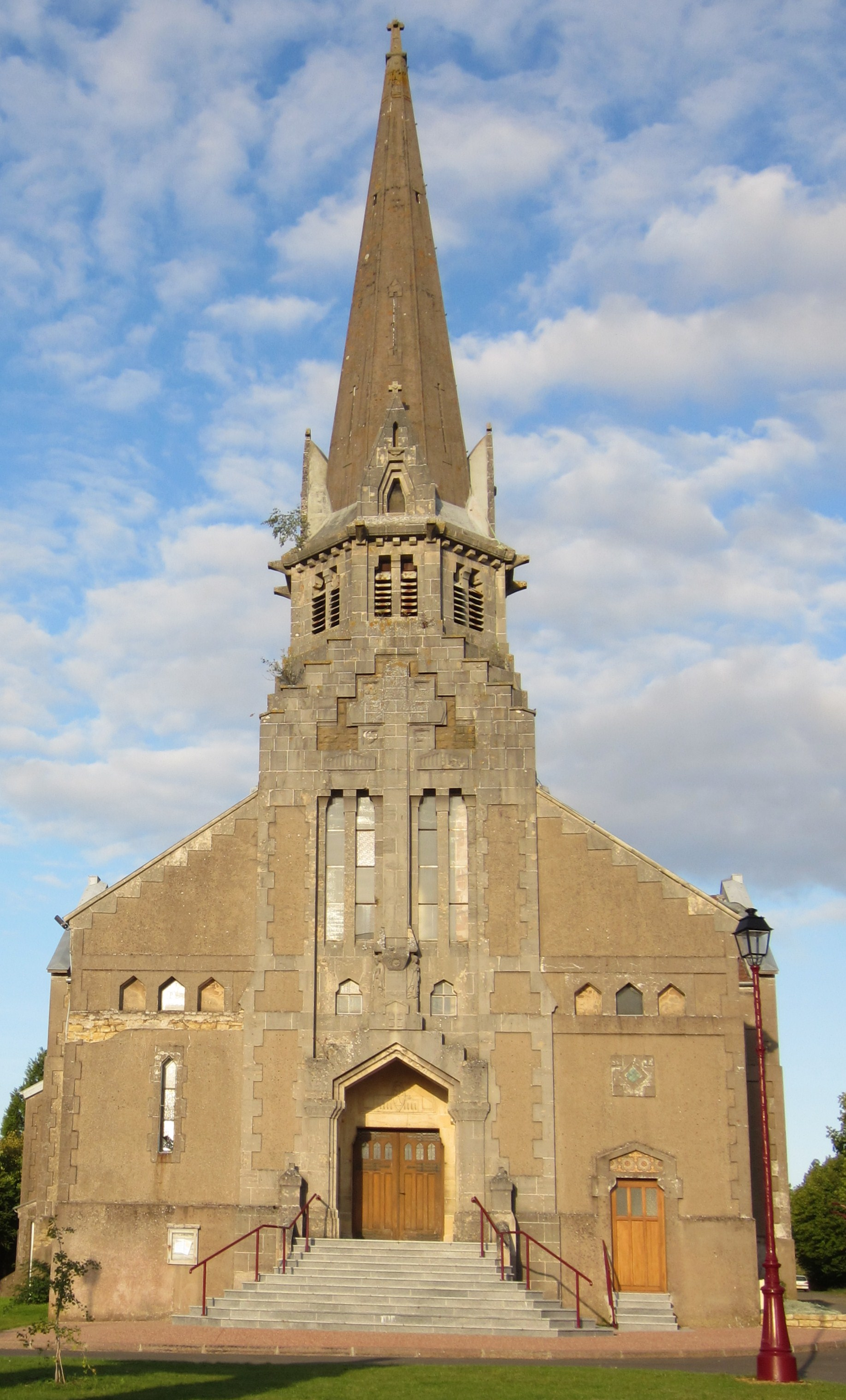 Piennes Nouvelle eglise